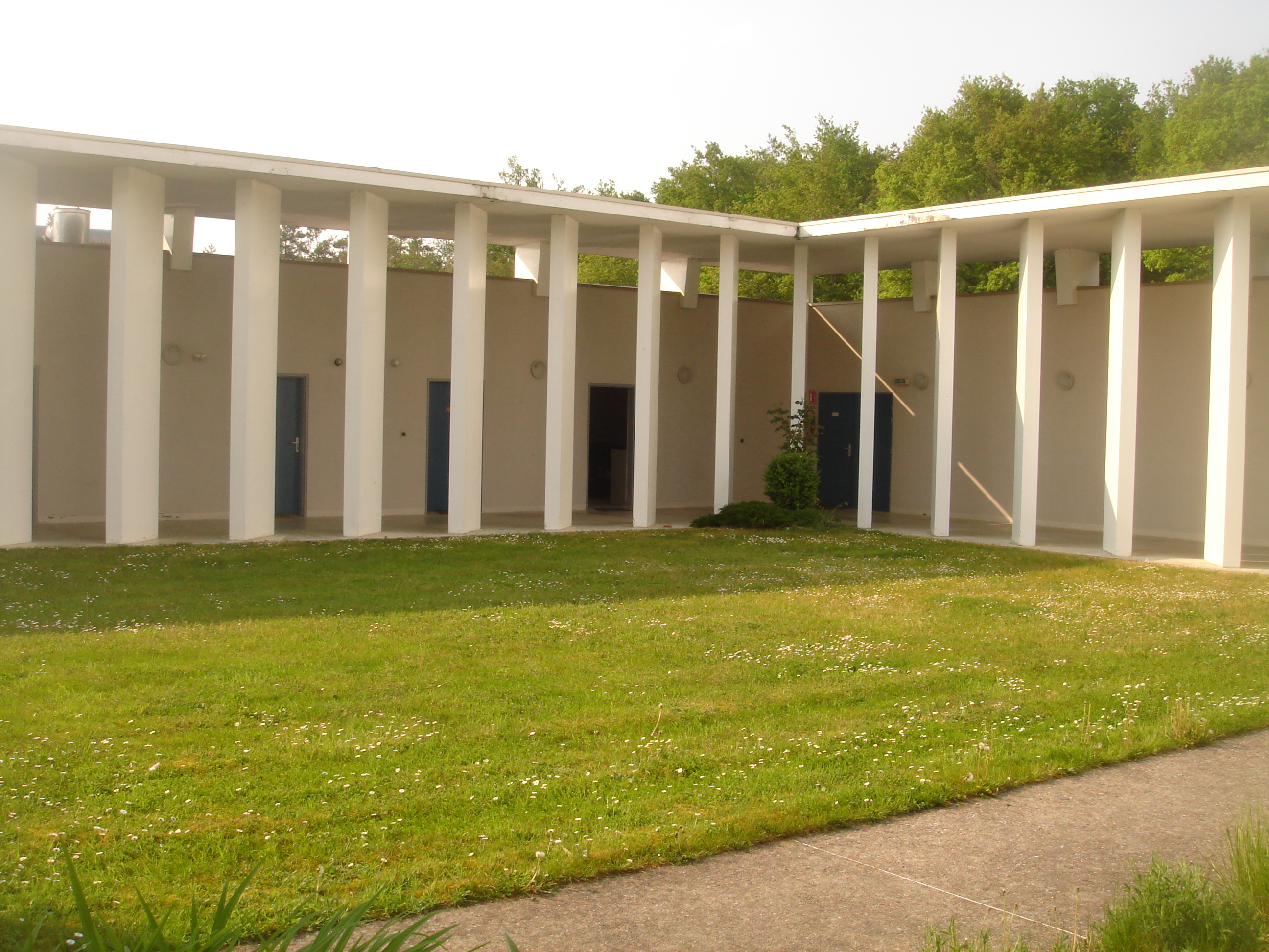 Monastère Notre-Dame de Bouzy-la-Forêt, Loiret, Centre, France